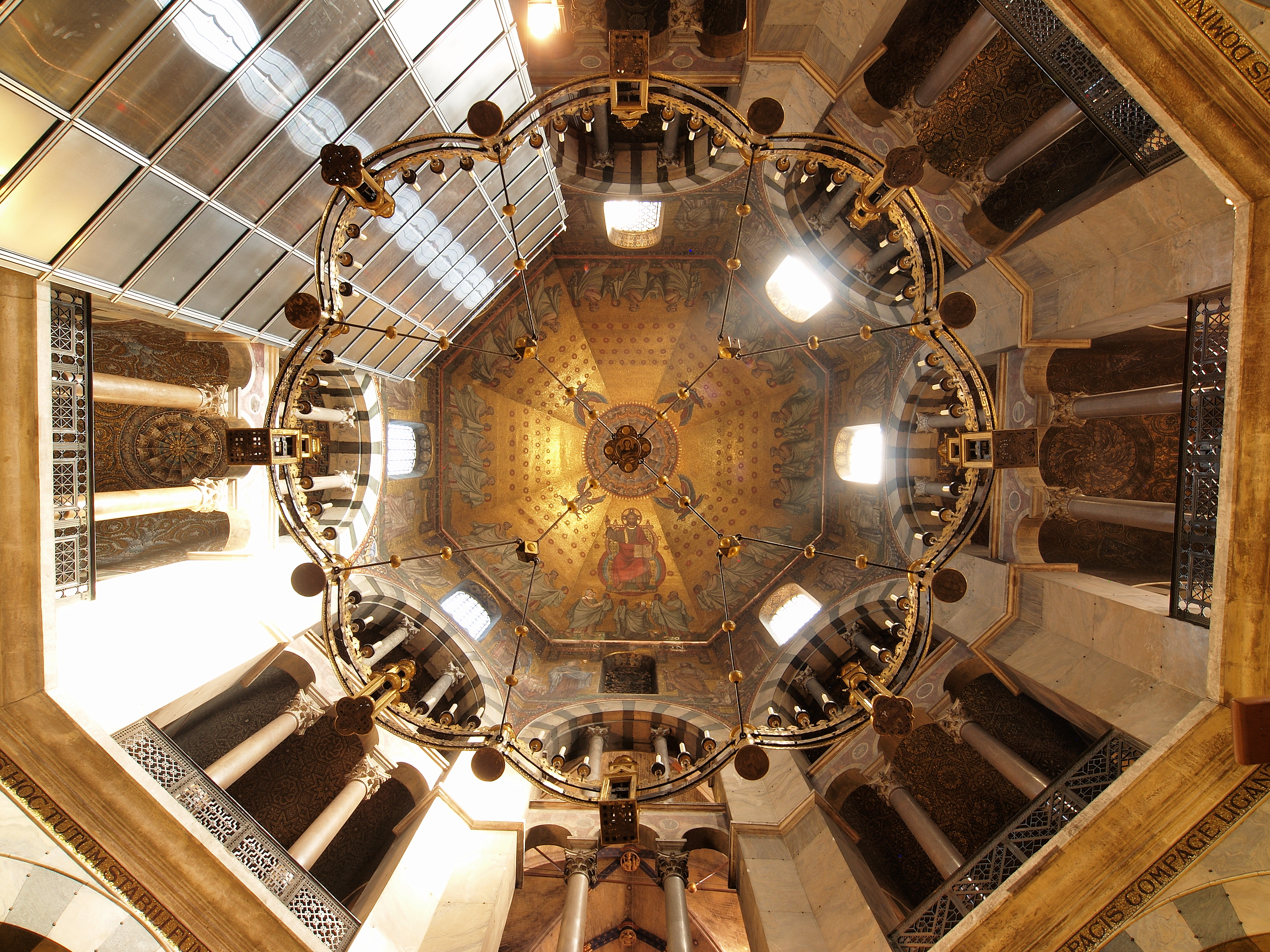 Der Barbarossaleuchter unter der Kuppel des Oktogons im Aachener Dom